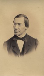 French entomologist Charles Brisout de Barneville (1822-1893)